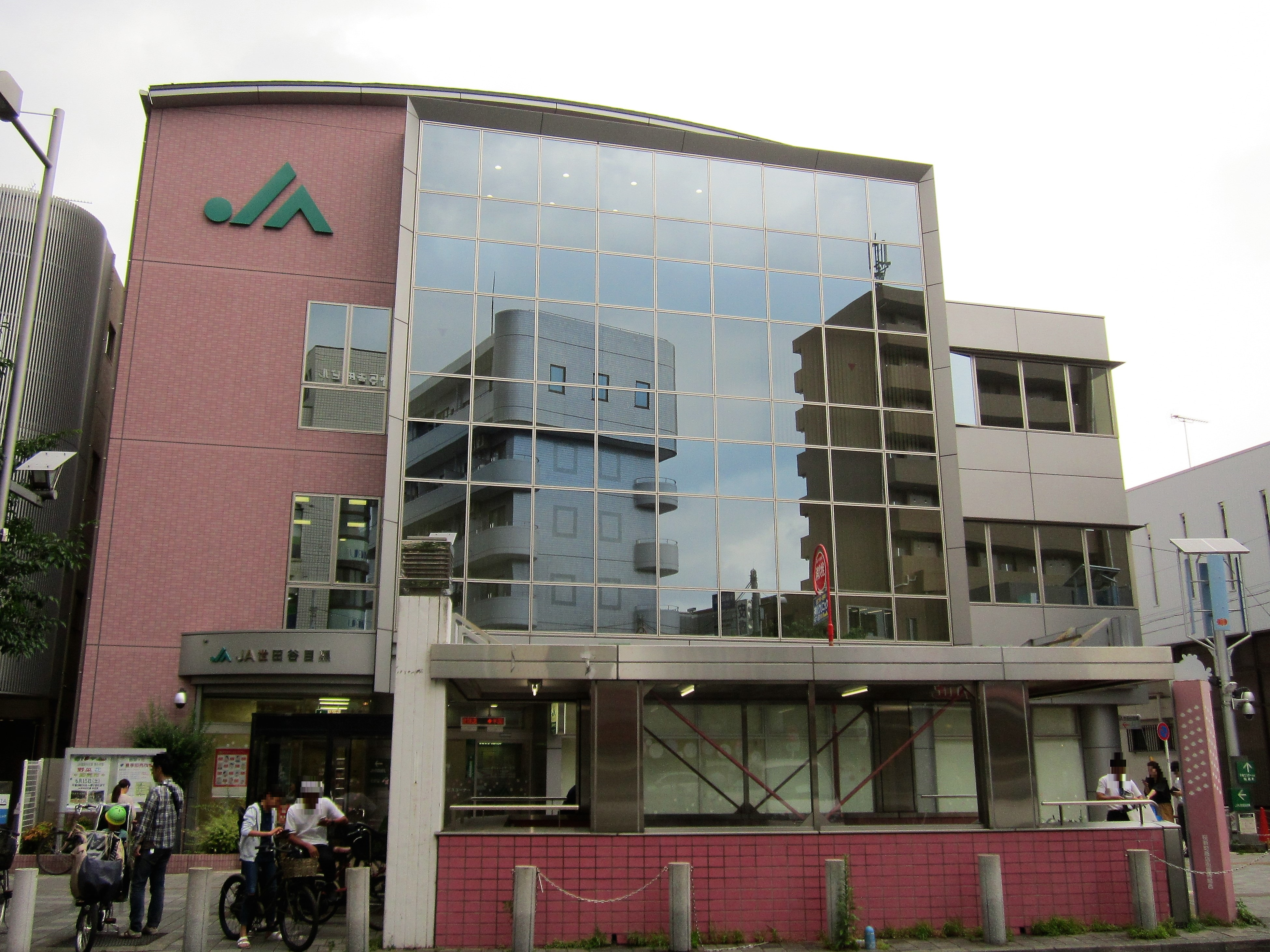 世田谷目黒農業協同組合 本店（世田谷区桜新町）